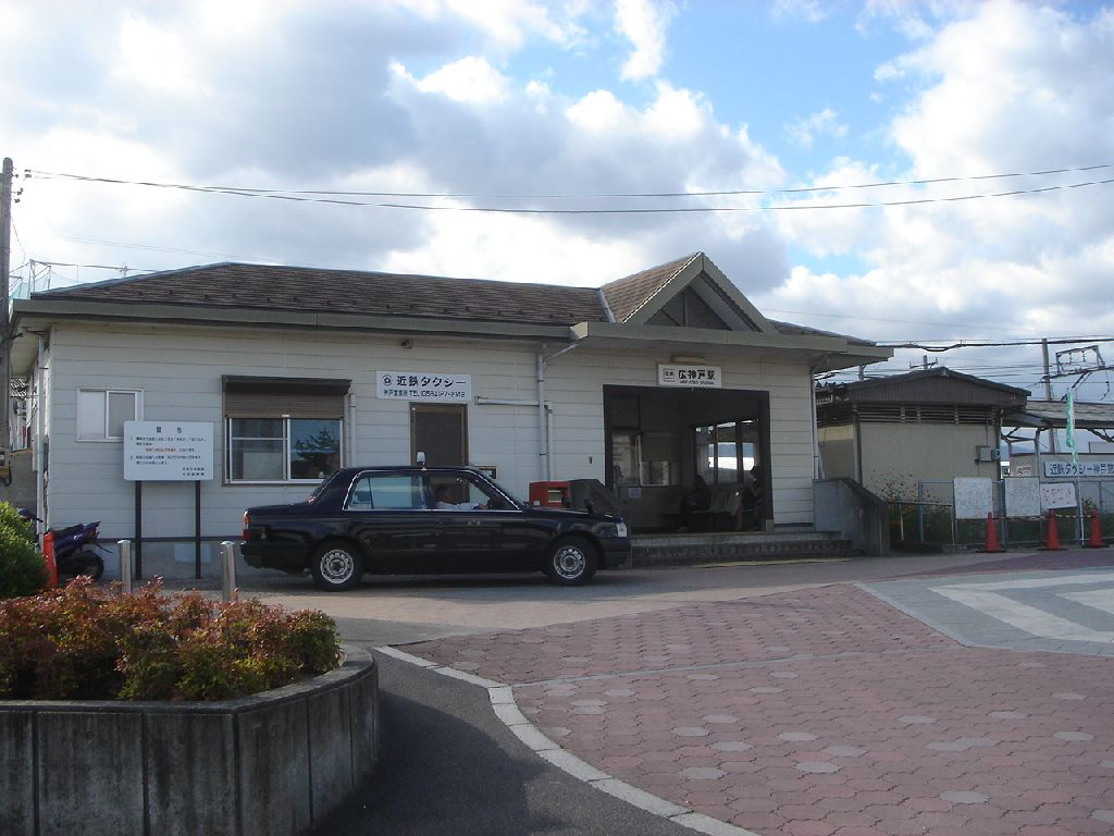 広神戸駅